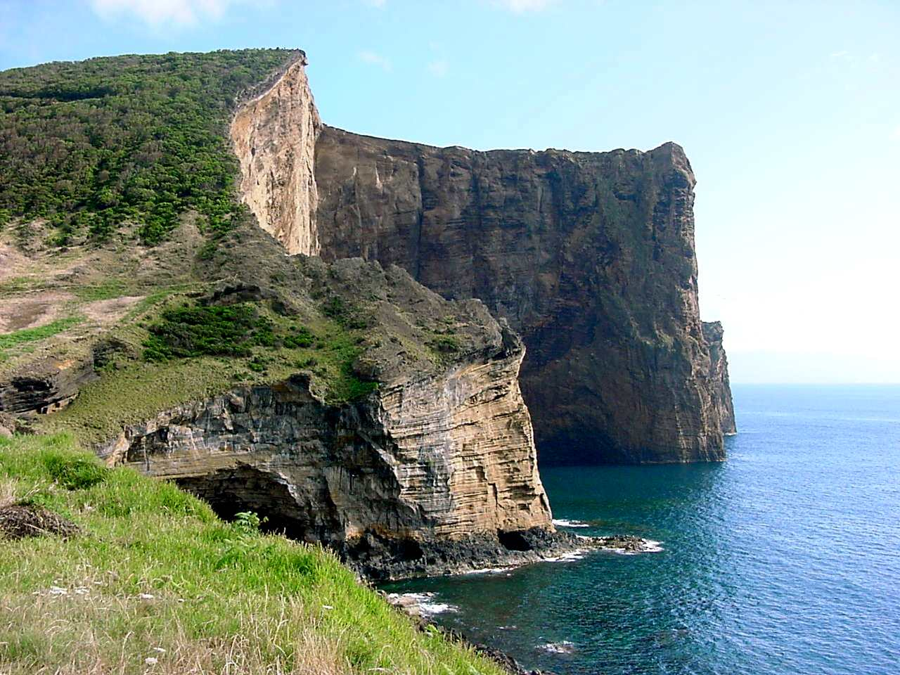 Morro de Velas, Costa Sul da ilha de São Jorge, Açores, Portugal